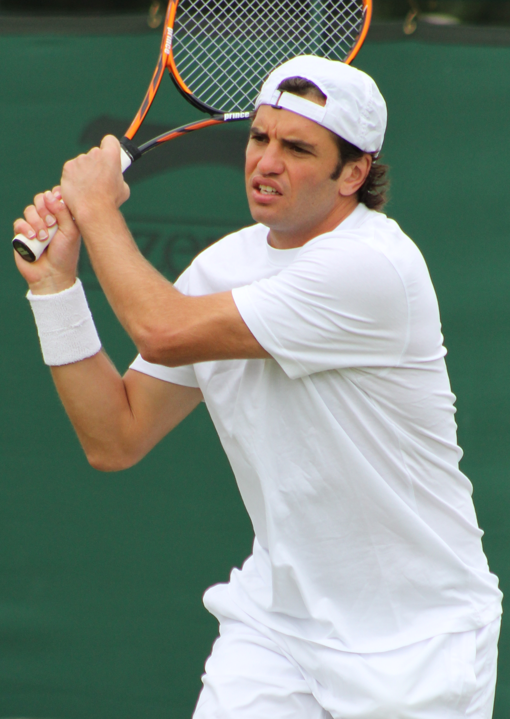 Jaziri WMQ14 (4)